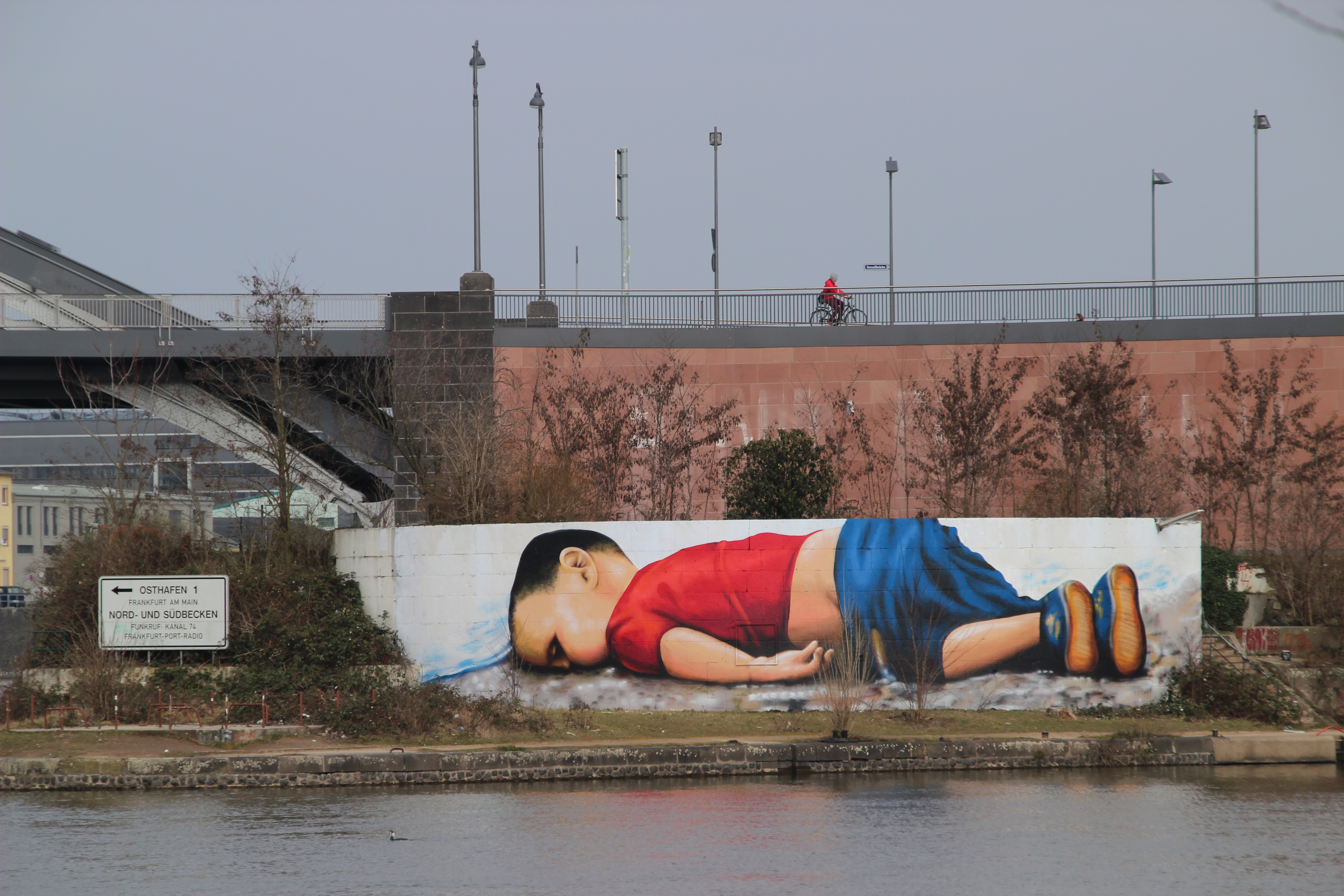 Bildinhalt: Der tote syrische Junge Aylan Kurdi. 120 Quadratmeter große Wandmalerei von Justus Becker und Oguz Sen am Frankfurter Osthafen Aufnahmeort: Frankfurt am Main, Deutschland